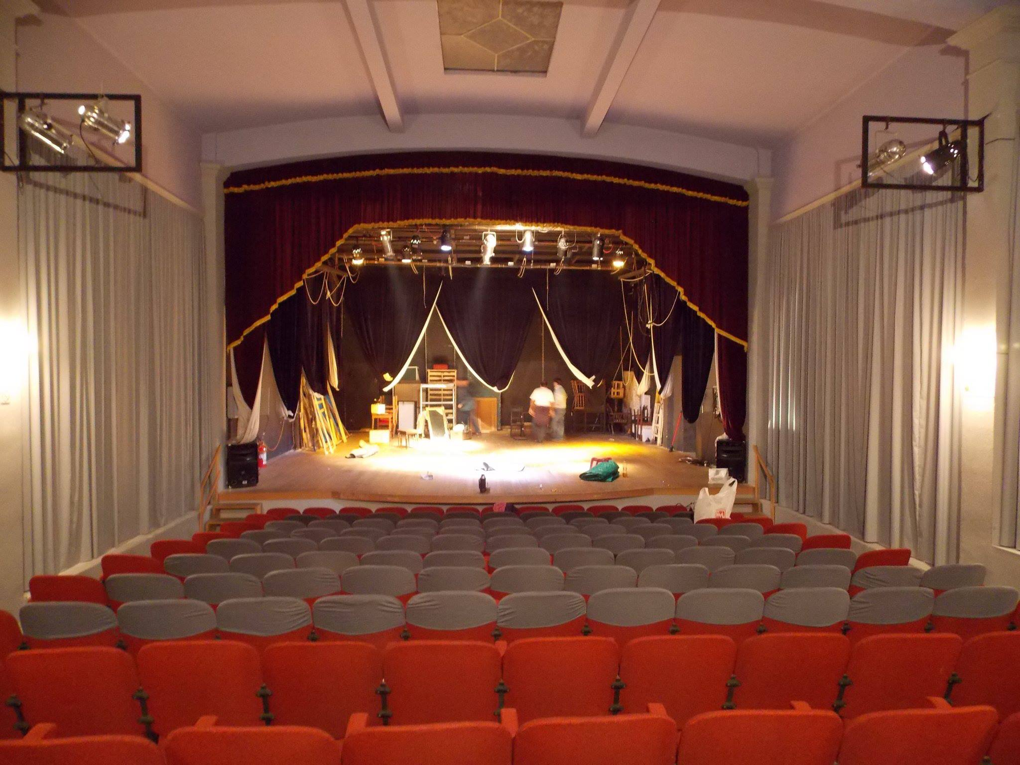 Panorámica del escencario